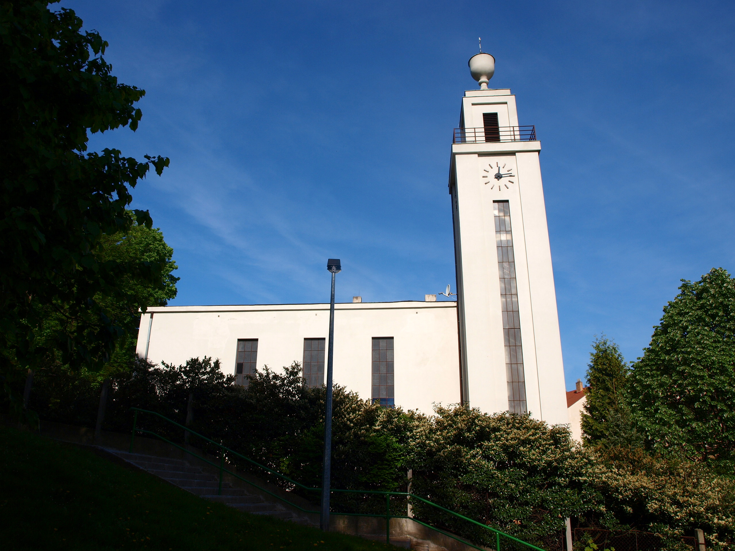 Husův sbor, Praha-Smíchov (Santoška)